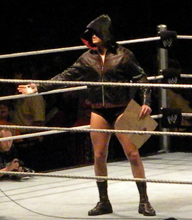 rhodes y sus bolsas de papel